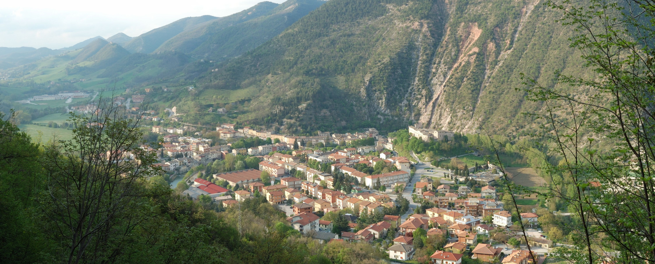 Vista di Piobbico da EST